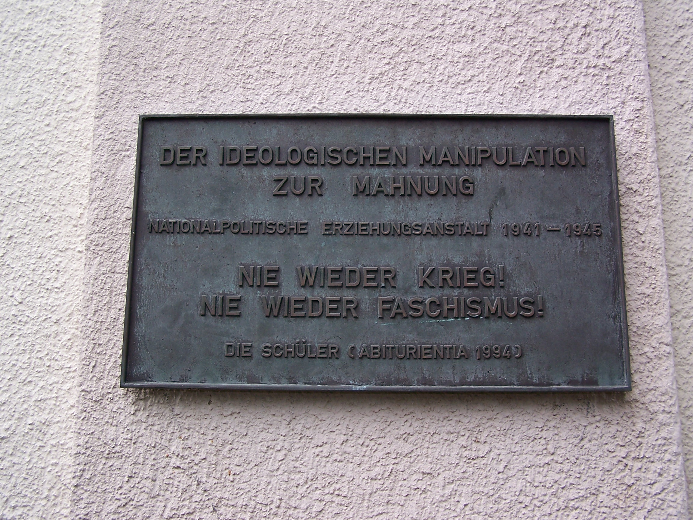 Plakette am A-Gebäude des KGH zur Erinnerung an die Zeit von 1941 bis 1945 als Ursulinen enteignet wurden und die Gebäude als NAPOLA genutzt wurden. (Angebracht durch den Abiturjahrgang 1994)